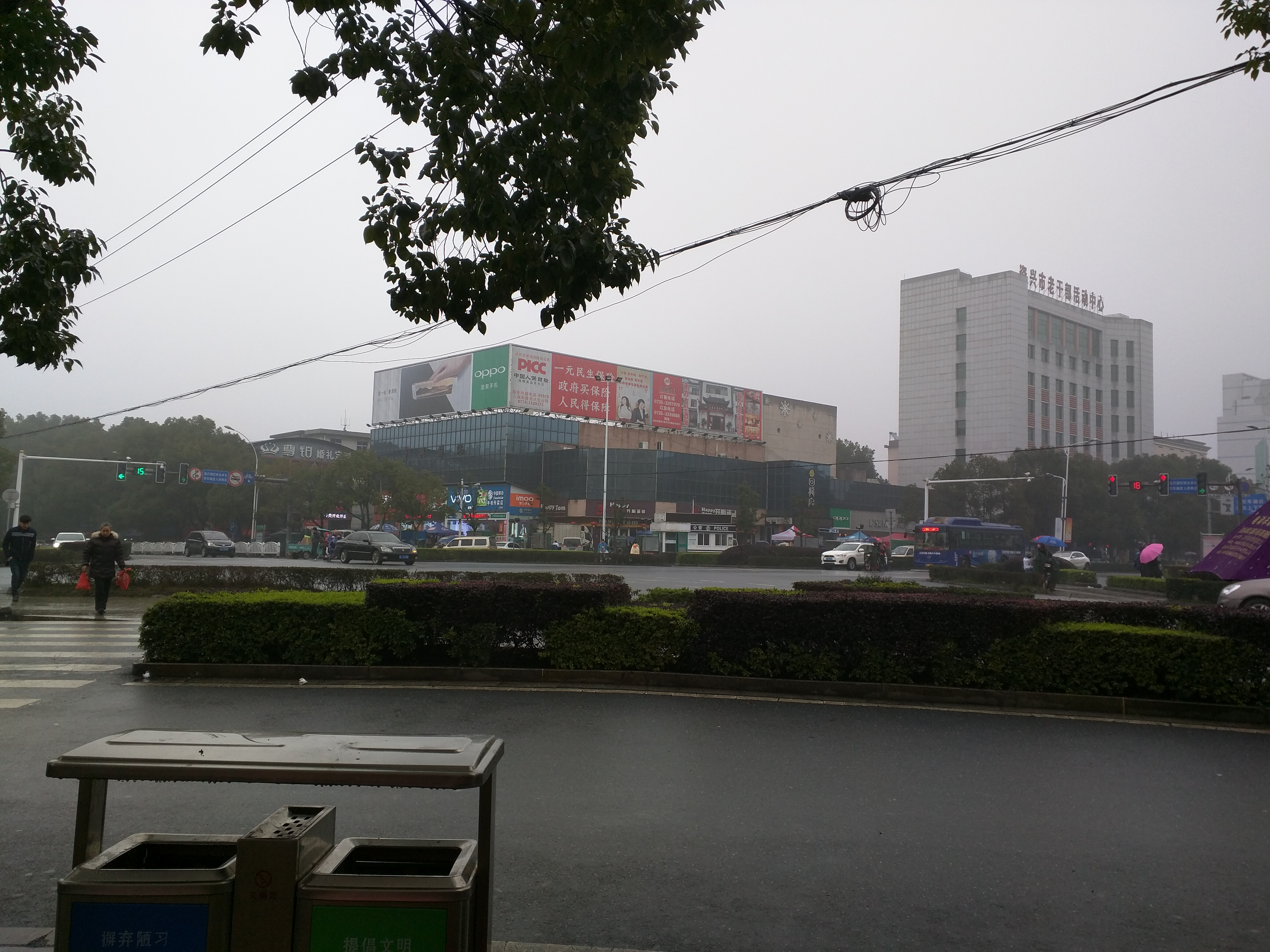 中文（中国大陆）: 中国湖南省郴州市资兴市“新区”唐洞街道兴华路（左，北）与阳安路（右，东）路口。